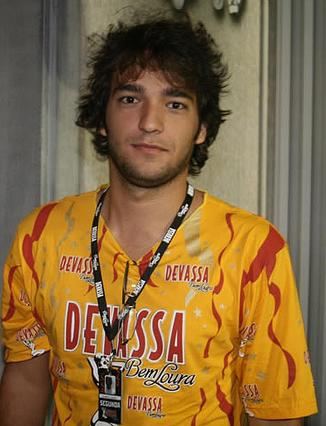 O ator Humberto Carrão vai assistir ao 2º dia de desfiles no Rio de Janeiro no camarote Devassa.